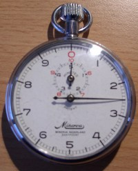 Mechanische cronometer